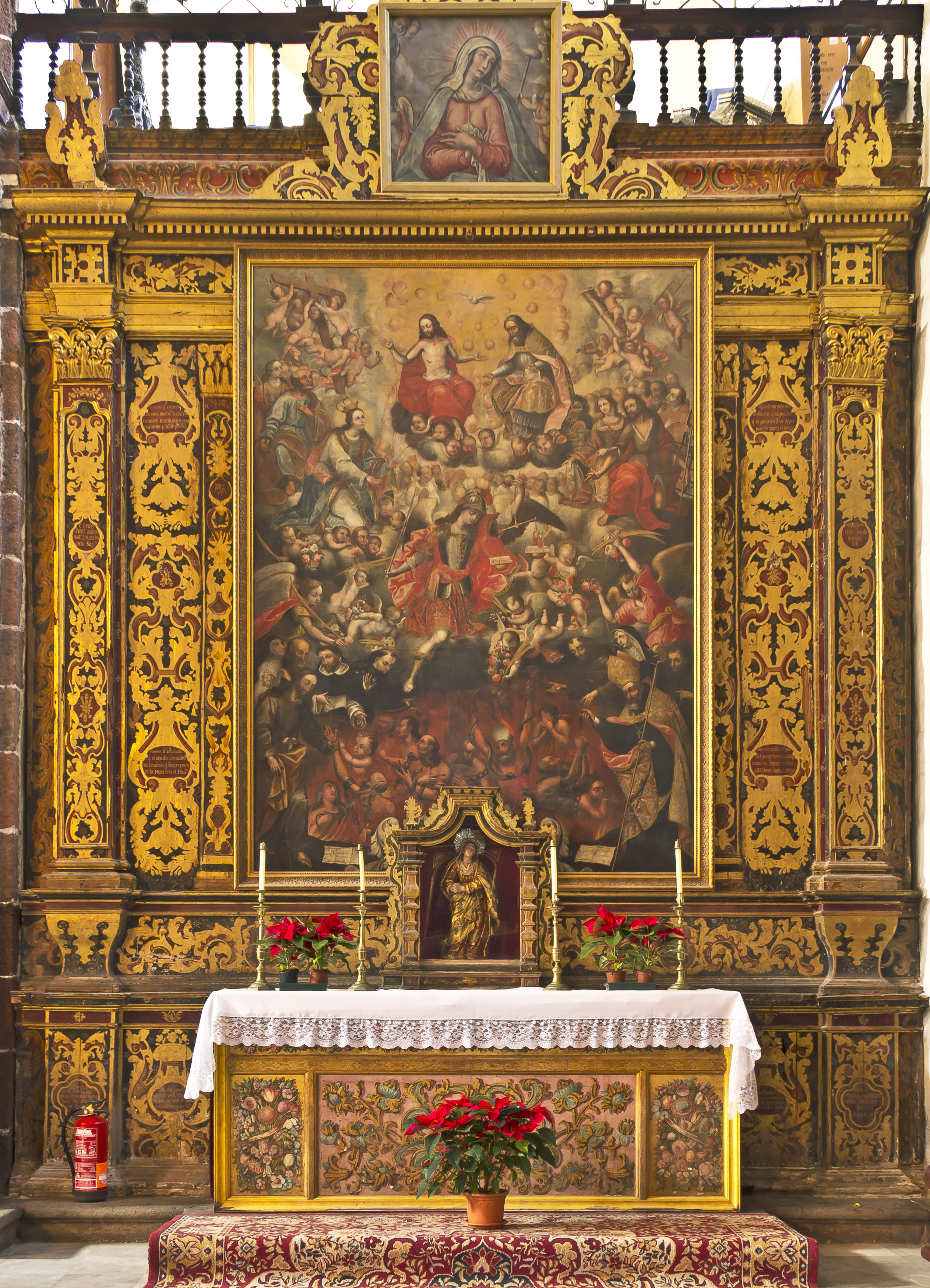 Kirche Nuestra Señora de la Concepción, Santa Cruz de Tenerife, Allerseelenkapelle im linken Seitenschiff